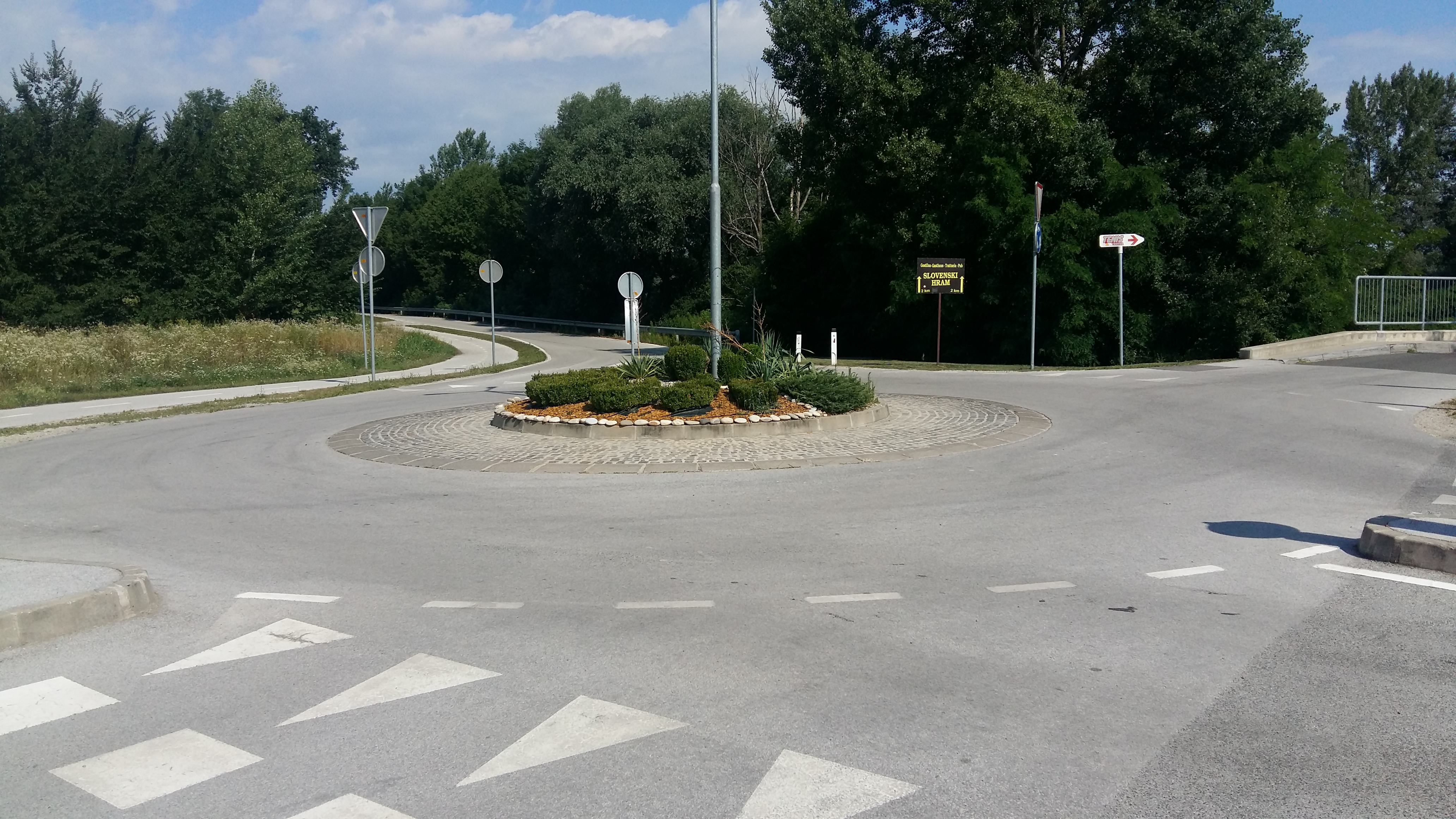 Krožno križišče